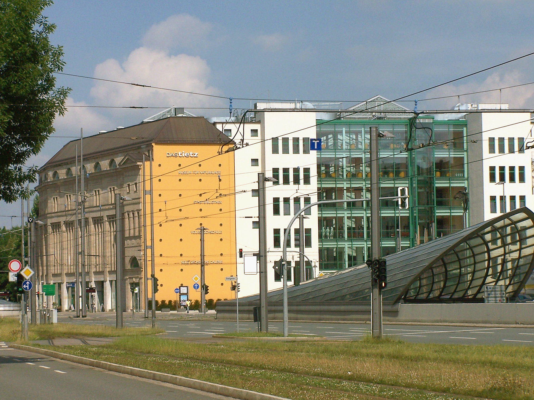 Beschreibung: Kulturkaufhaus DAStietz in Chemnitz; im Vordergrund die Bahnhofstraße, Quelle: selbst fotografiert am 27. Juni 2005, Fotograf: Reinhard Höll, Lizenzstatus: GNU FDL